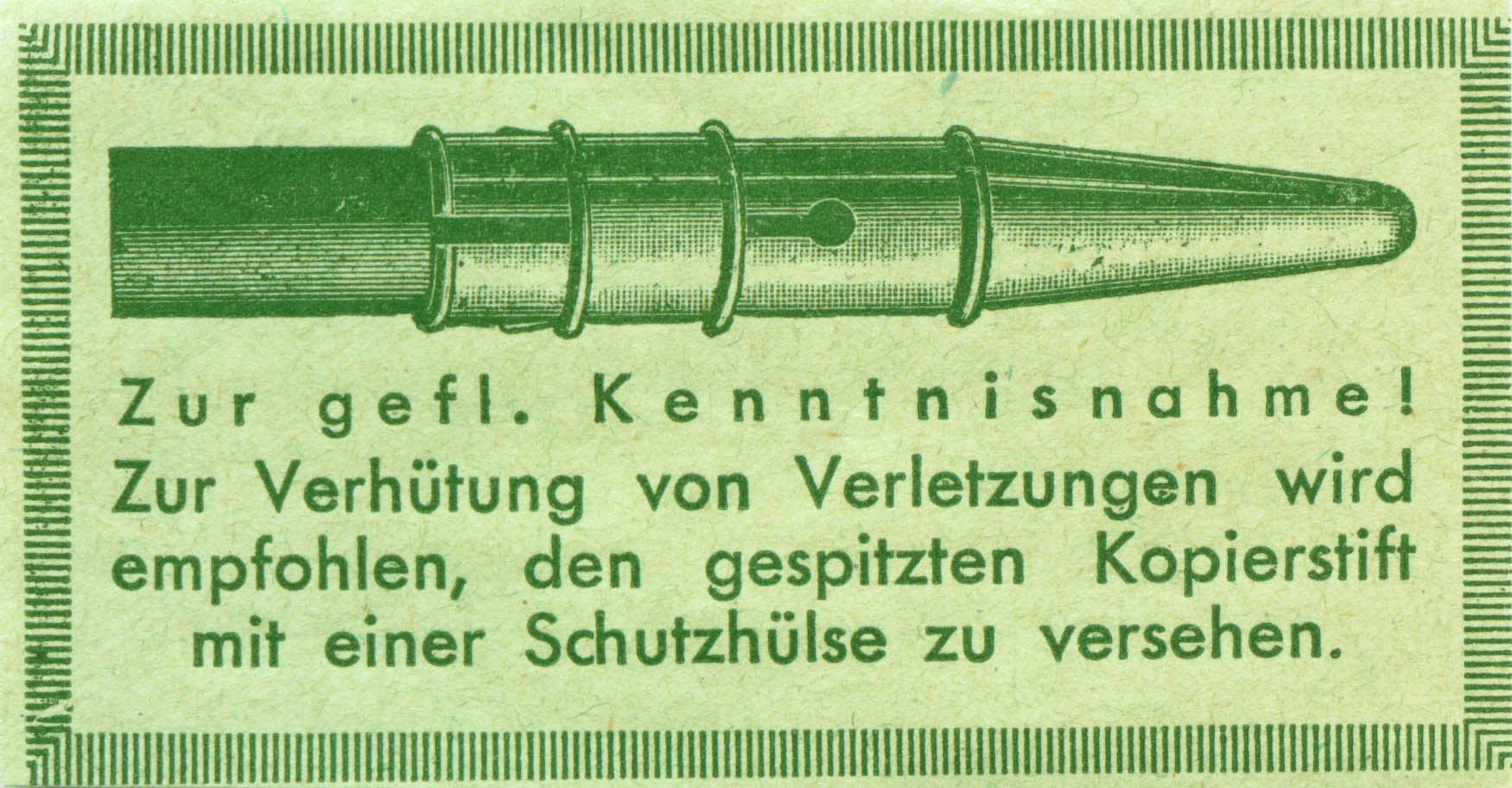 Hinweis auf Verwendung einer Shutzkappe bei gespitzten Kopierstiften.